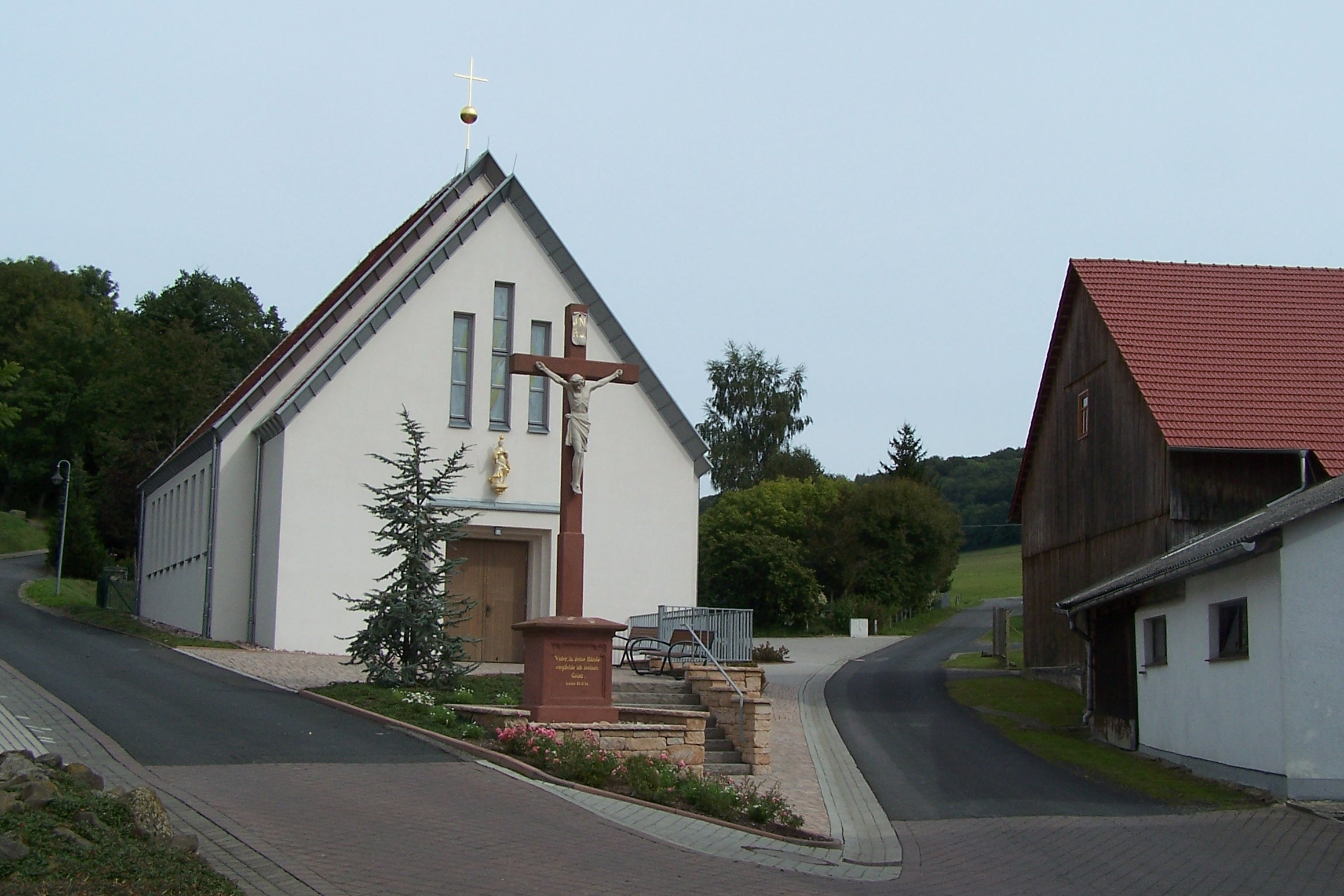 Gerstengrund